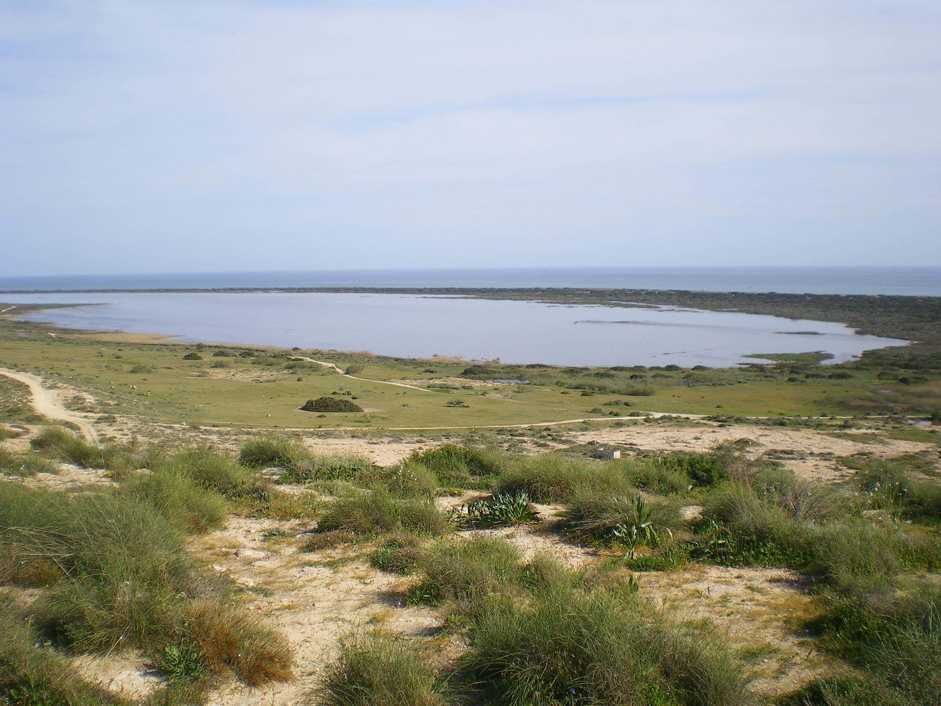 Fotografía del charcón de la Reserva Natural de Punta Entinas, El Ejido, Almería, España, tomada desde Los Alcores (norte).